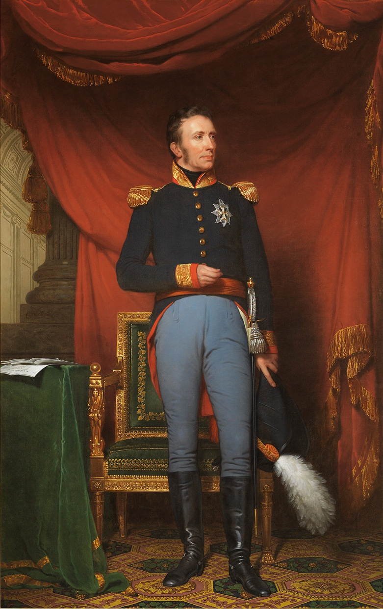 schilderij; portret; mansportret; Willem I, Koning